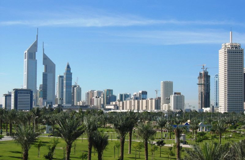 Dubai skyline